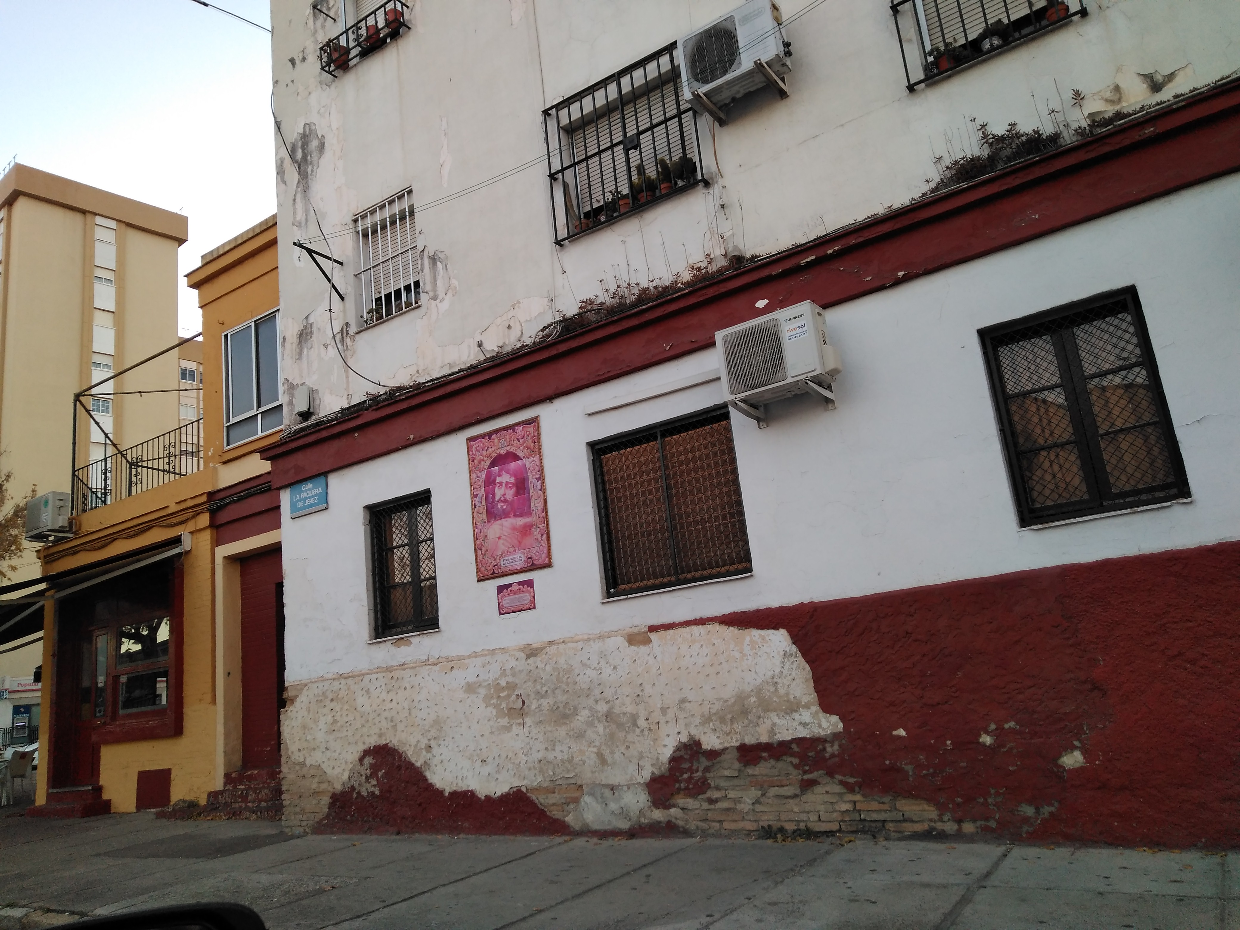 calle dedicada a La Paquera de Jerez, Jerez de la Frontera